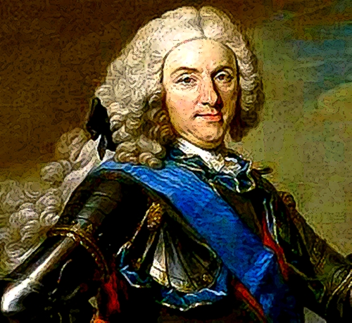 Variante digital del cuadro pintado por Louis-Michel van Loo.